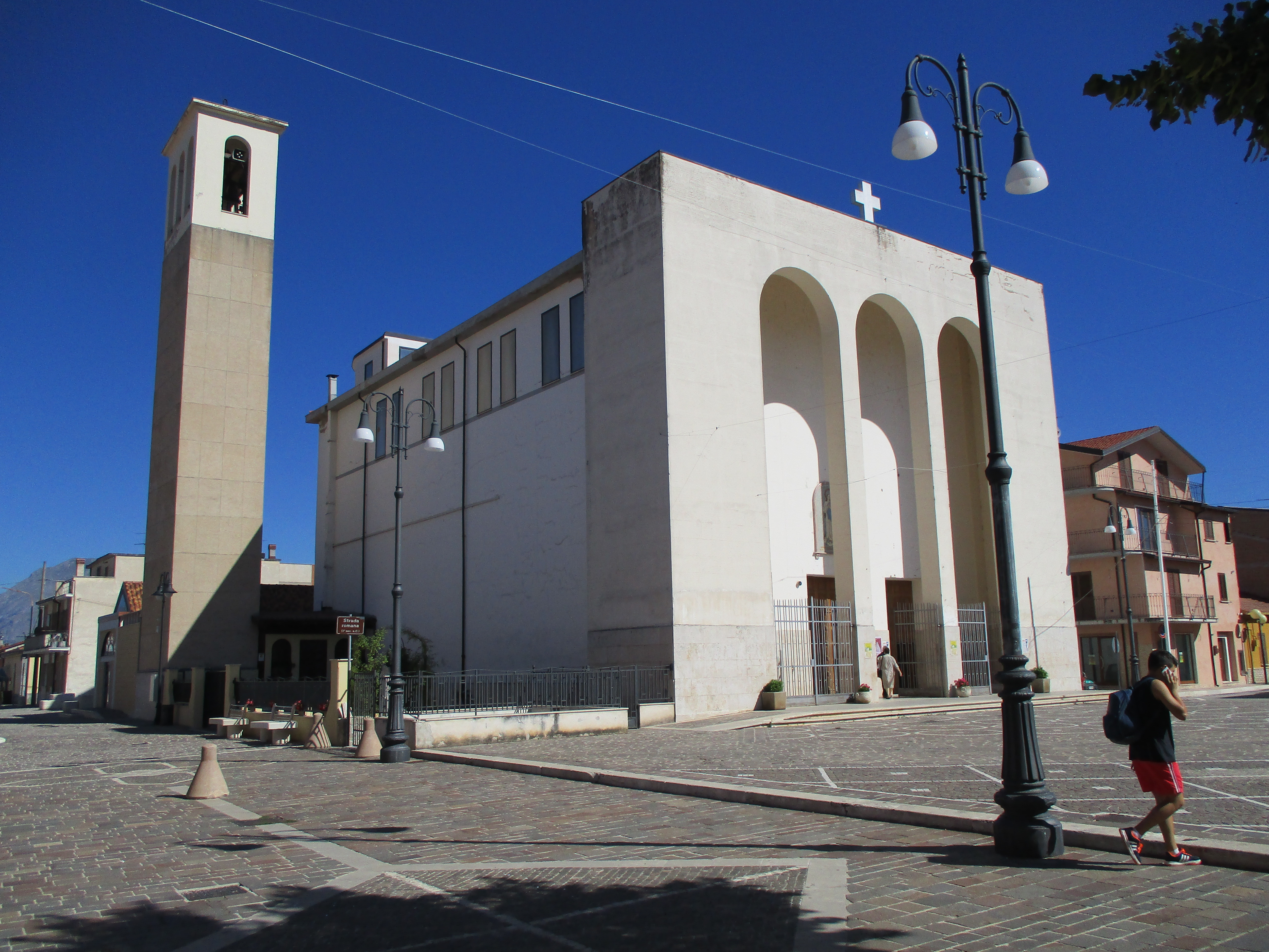 Chiesa e campanile